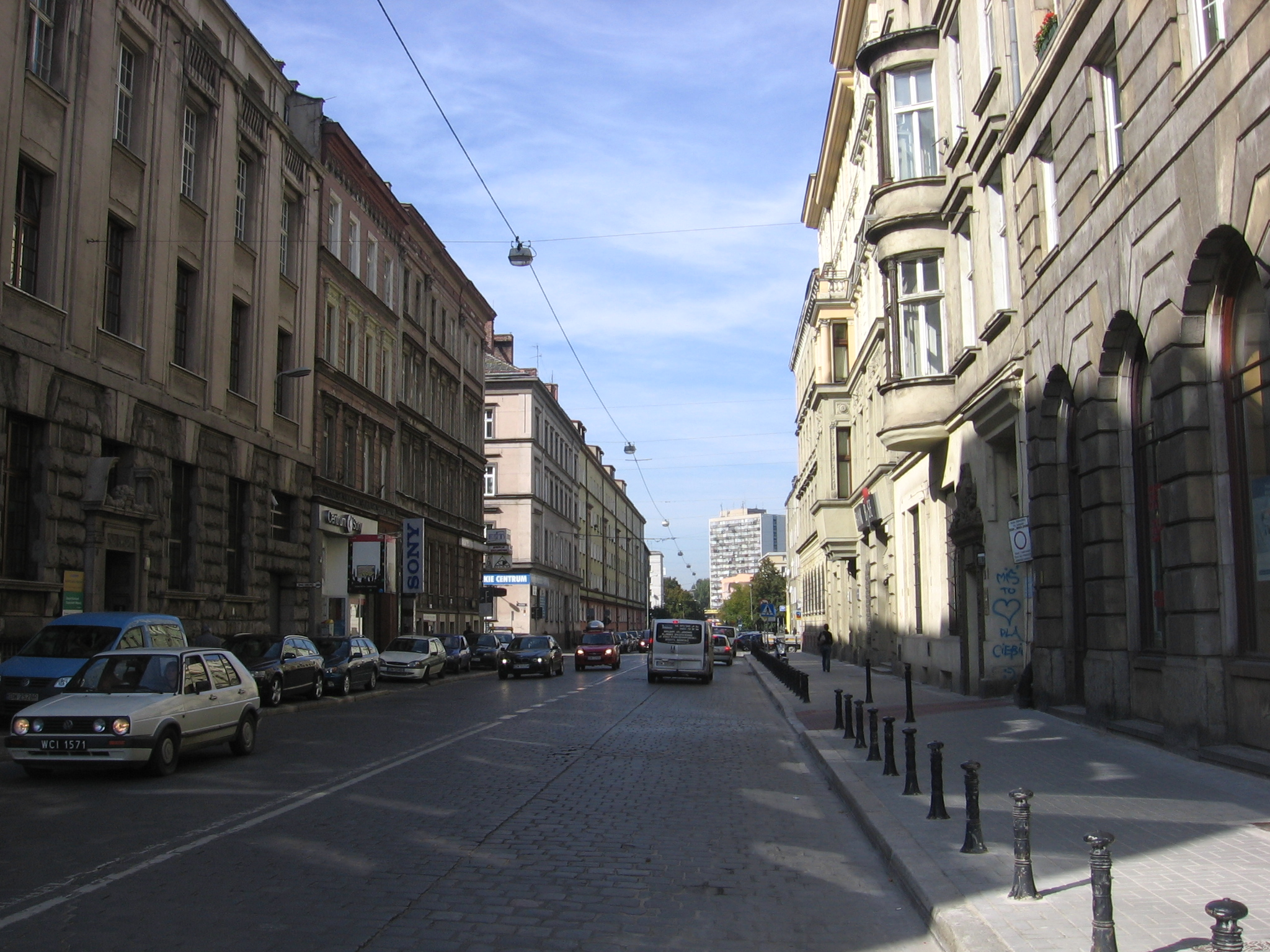 ulica Kościuszki, widok z placu Kościuszki na zachód